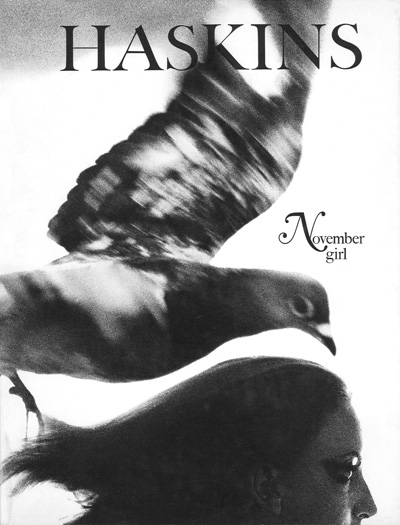 Titelbild des Bildbandes November Girls